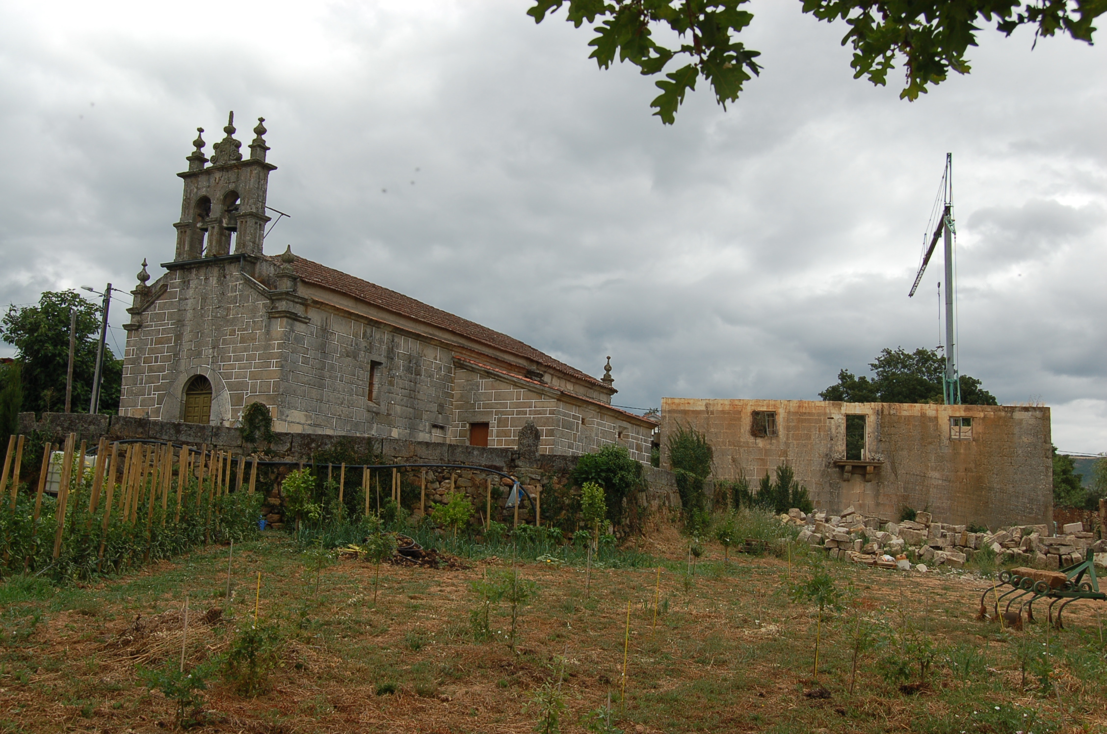 Igrexa e reitoral de Vilamaior do Val, Verín